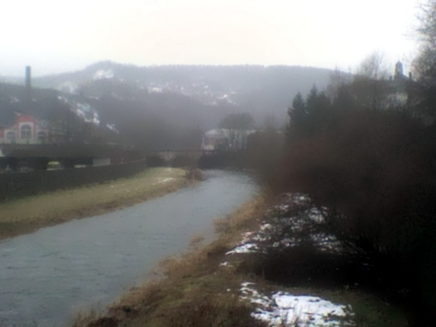 Sieg zwischen Niederschelden und Niederschelderhütte